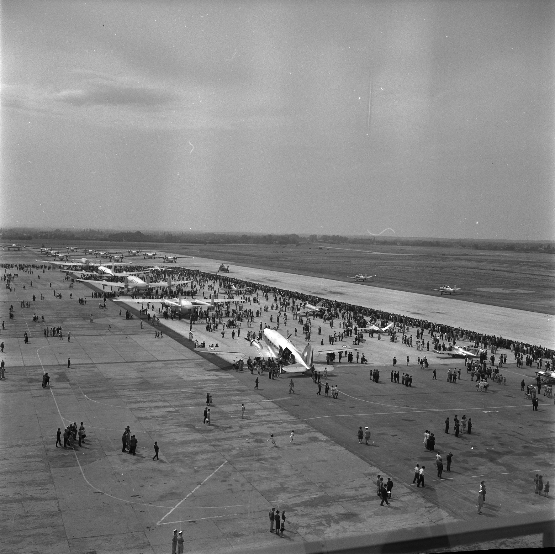 Base aérienne de Francazal (route de Seysses). 9 juin 1963. Vue générale en plongée de la base aérienne : avions exposés sur le tarmac. Cliché pris lors d'une journée portes ouvertes organisée sur la base.